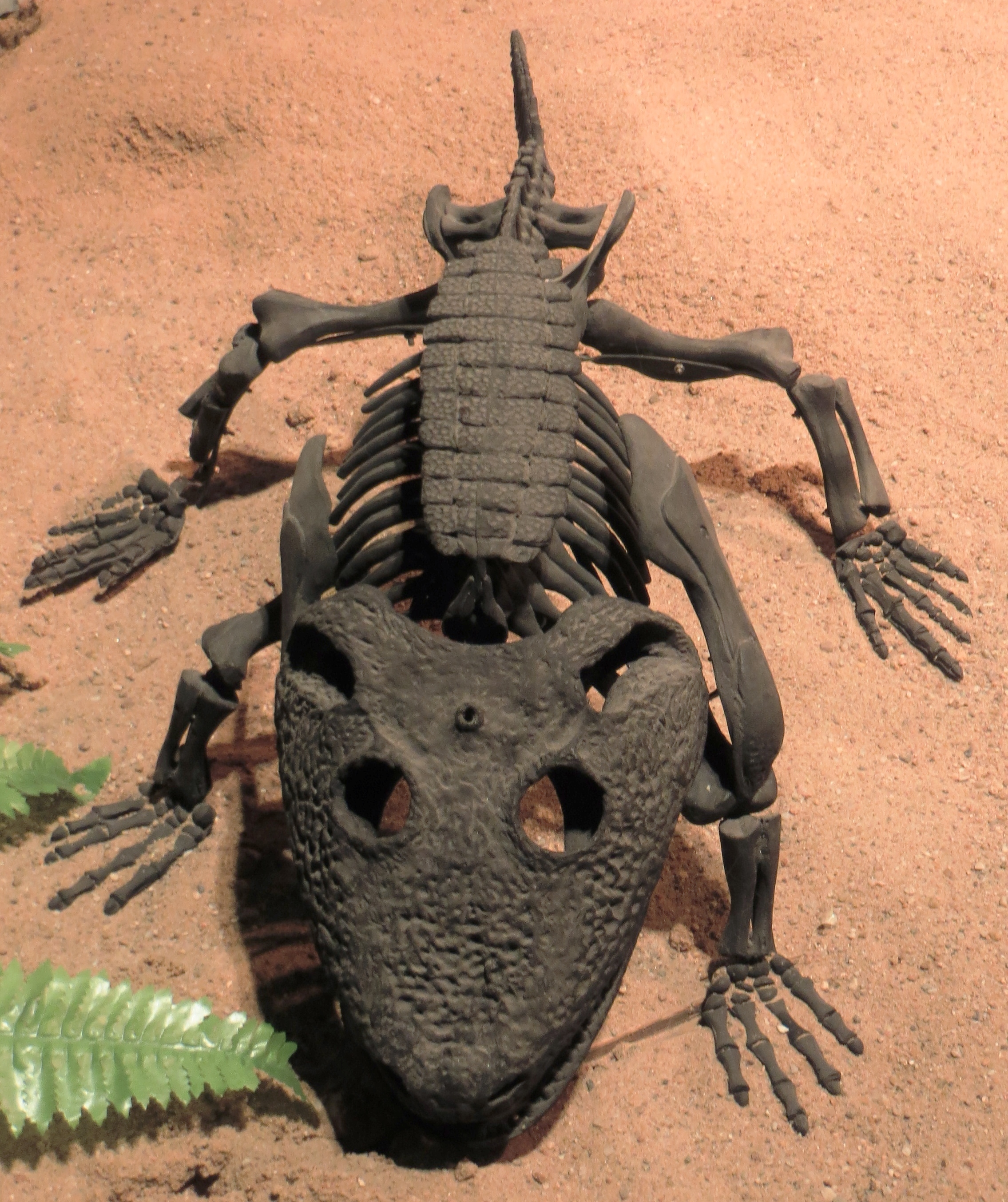 Fossil of Kamacops, an extinct amphibian- Took the picture at Dinosaurium, Prague